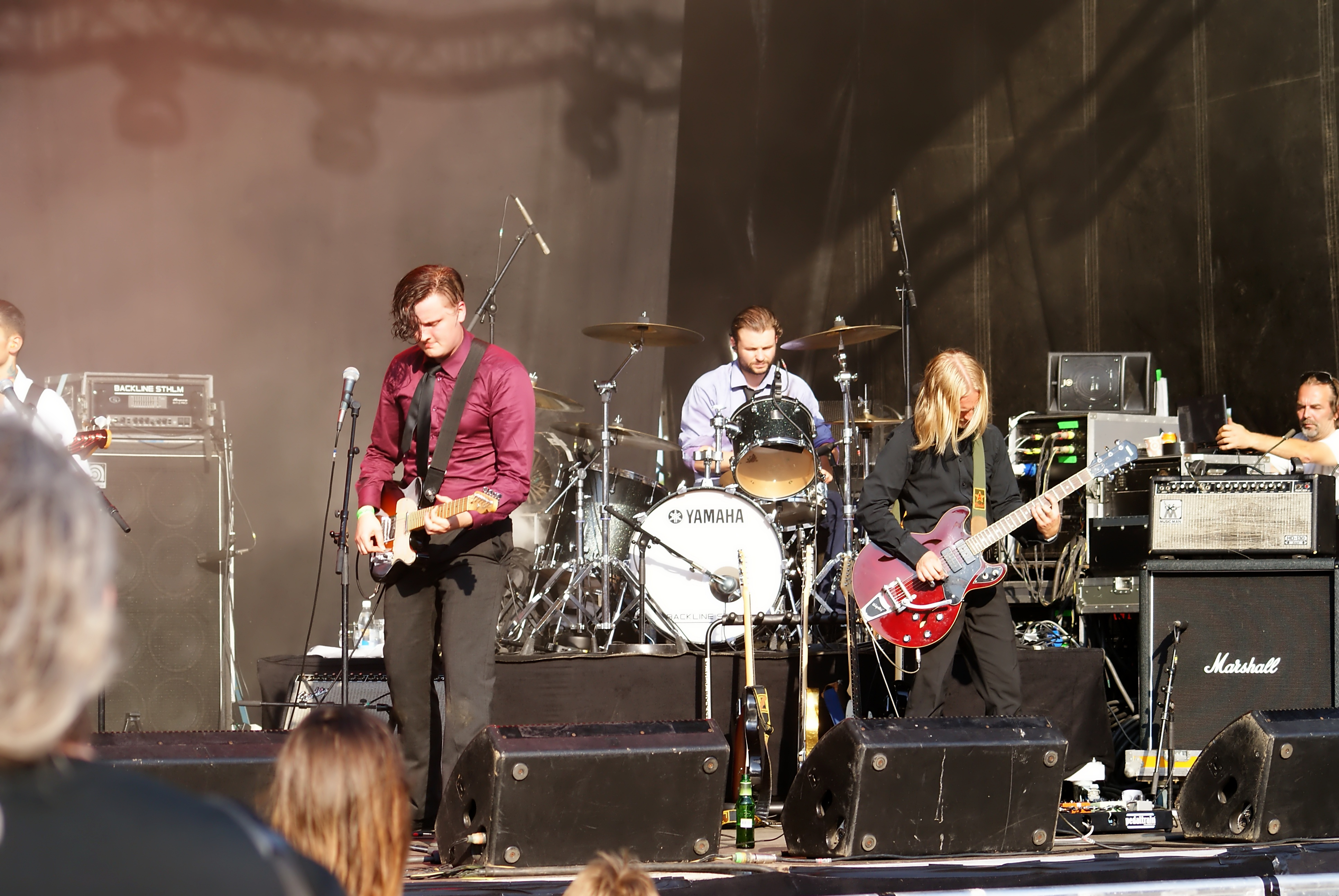 Kellermensch på Roskildescenen på Stockholms Kulturfestival 2010